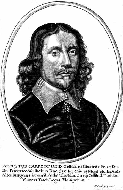 Kupferstich August Carpzov (1612-1683) Jurist und Staatsmann